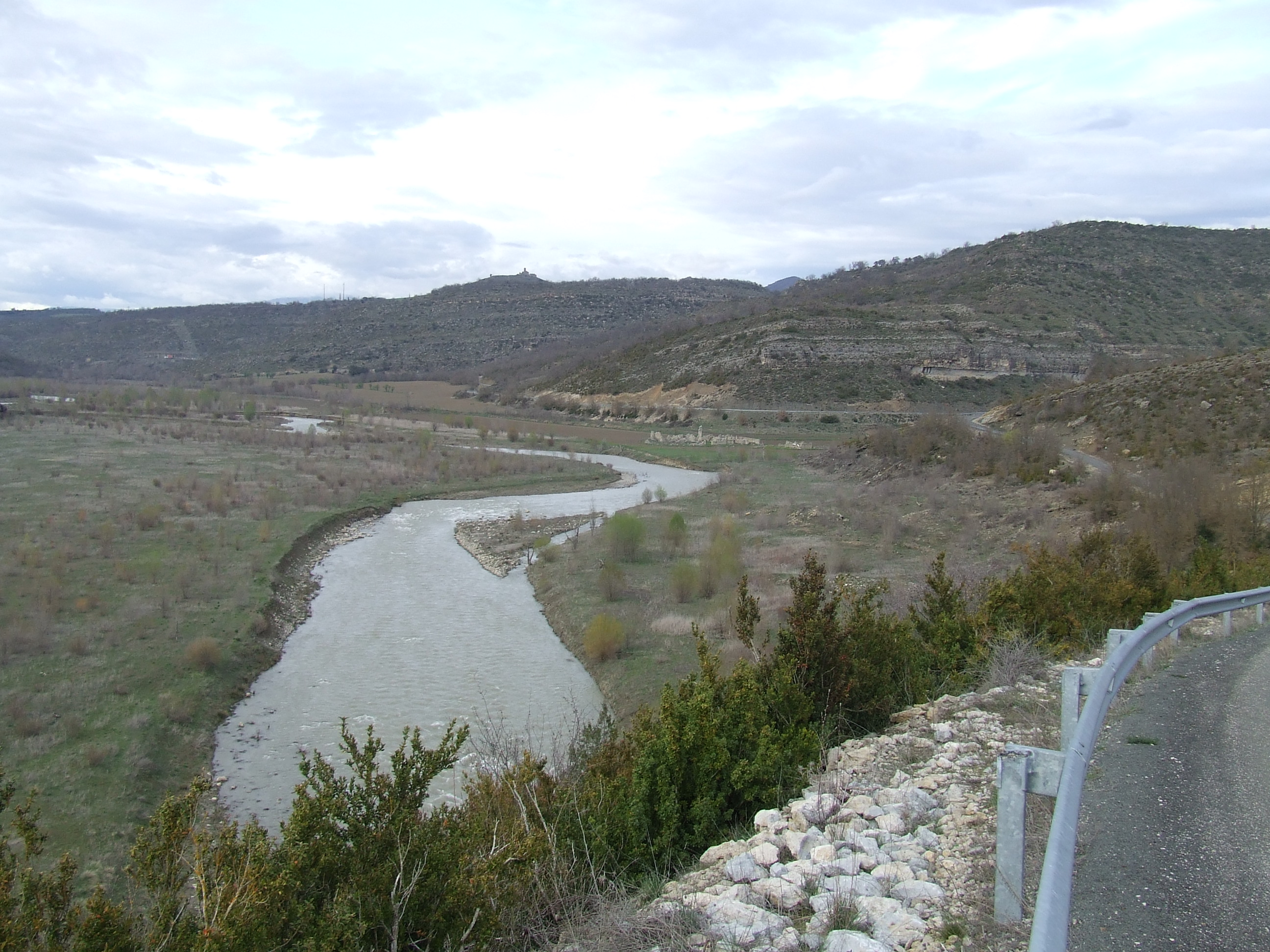 Lloc que acollia la part principal del poble de Mont-rebei (Sant Esteve de la Sarga, Pallars Jussà)